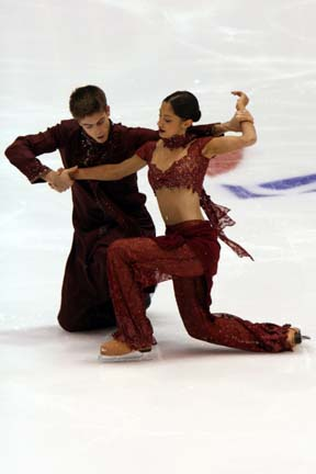 Maureen Ibanez and Neil Brown at the 2007-2008 Junior Grand Prix event in Lake Placid, New York, United States